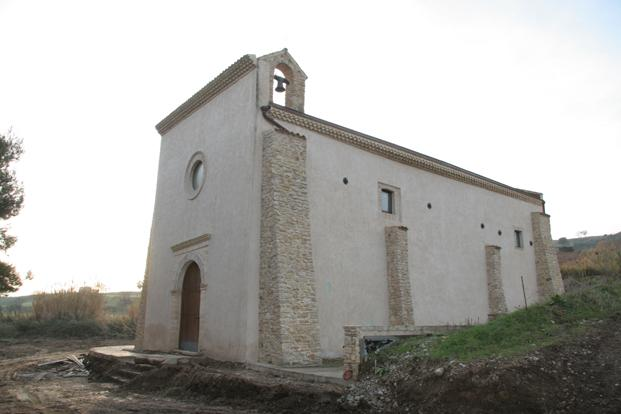 Chiesa della Madonna della Pietà